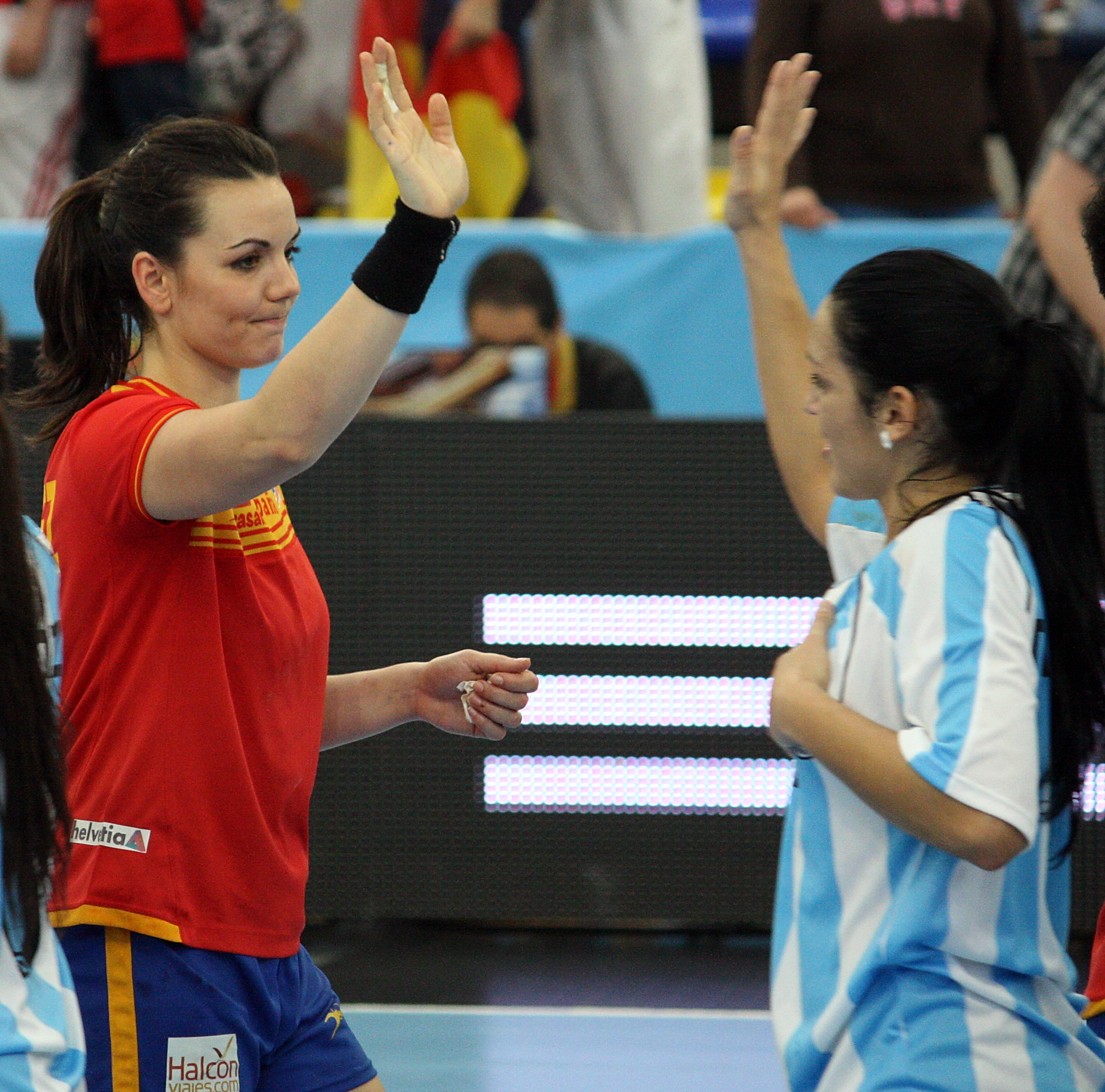 Beatriz Fernández en el torneo celebrado en España, del 25 al 27 de mayo de 2012, clasificatorio para los Juegos Olímpicos de Londres 2012.